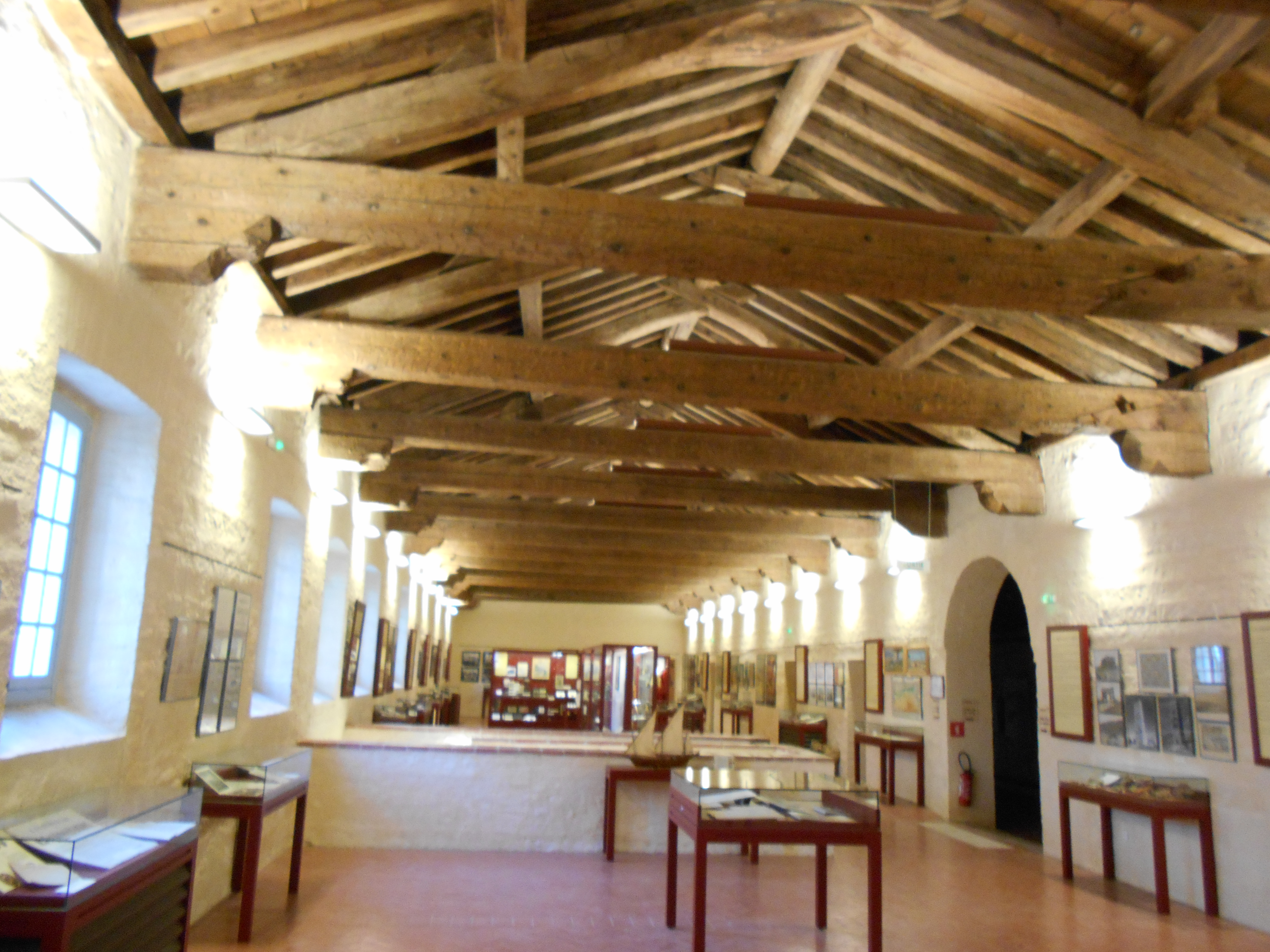 Sala d'exposicions del Centre de documentació, antic dormitori conventual.